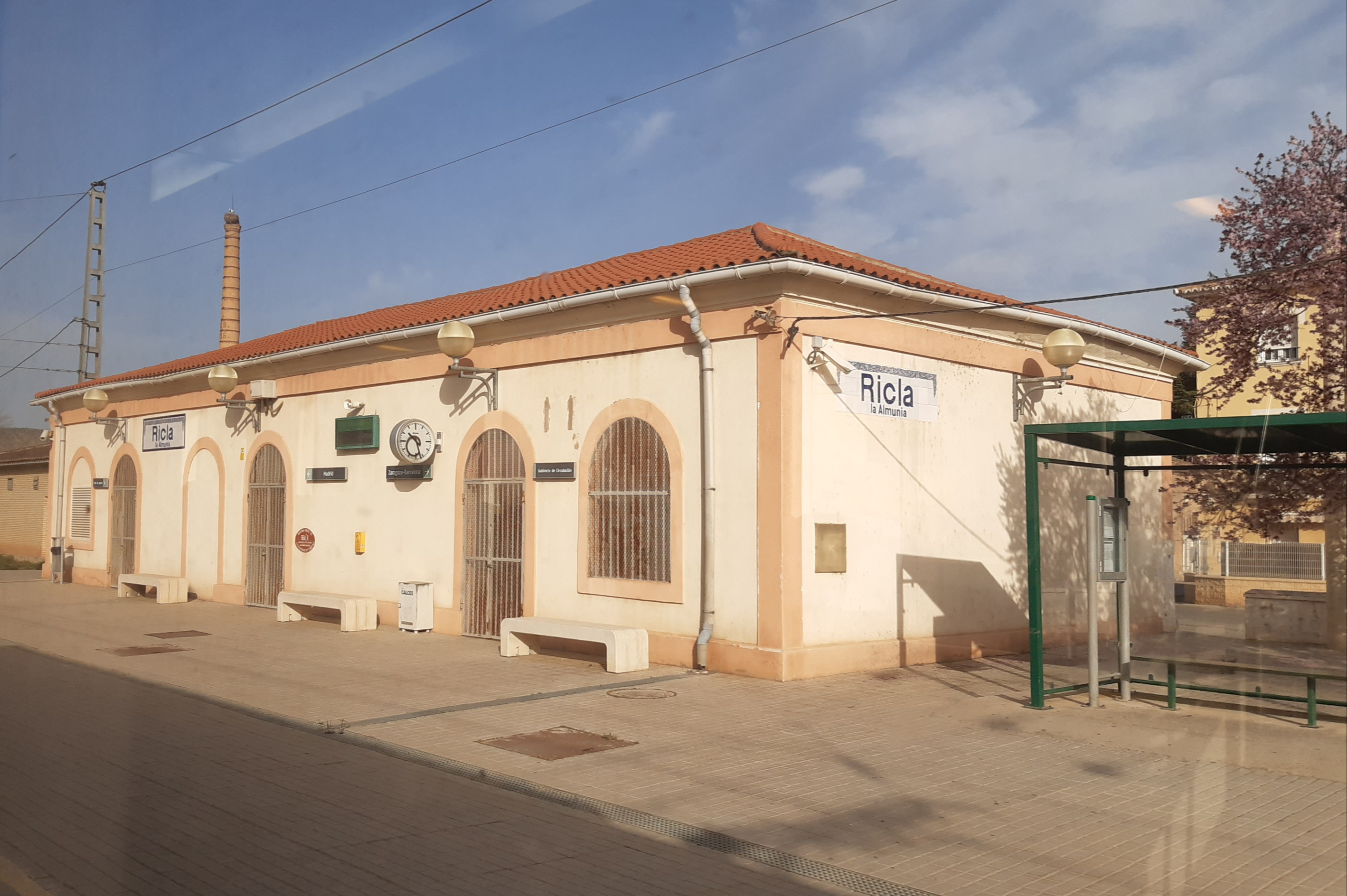 Edificio de viajeros de la estación de Ricla-La Almunia en febrero de 2020, vista desde un regional R-470 procedente de Lérida.